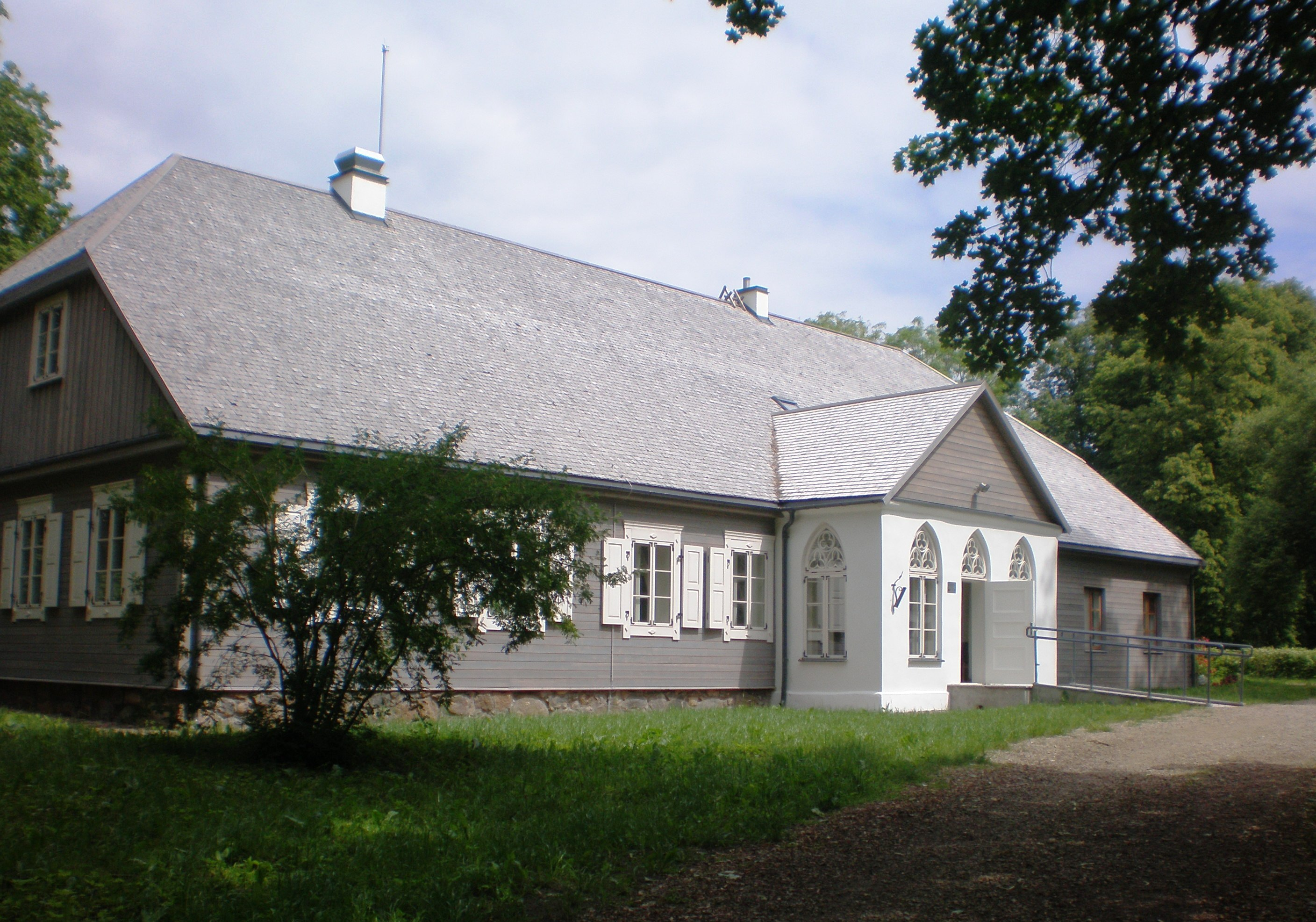 1863 m. sukilimo muziejus, Paberžės dvaras, Kėdainių raj.